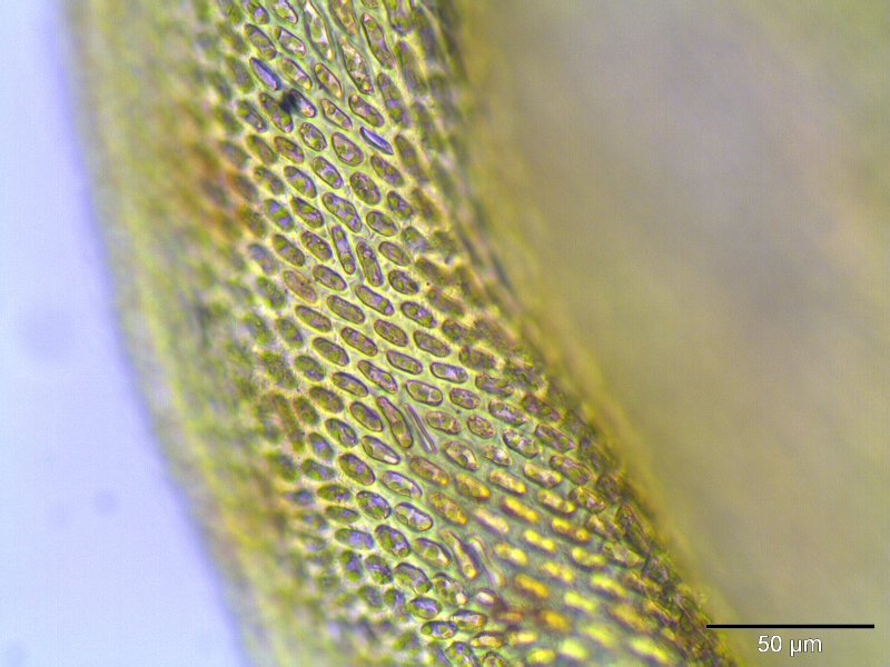 Eichhörnchenschwanz-Weißzahnmoos (Leucodon sciuroides), Blattrand, Vergrößerung: 400x